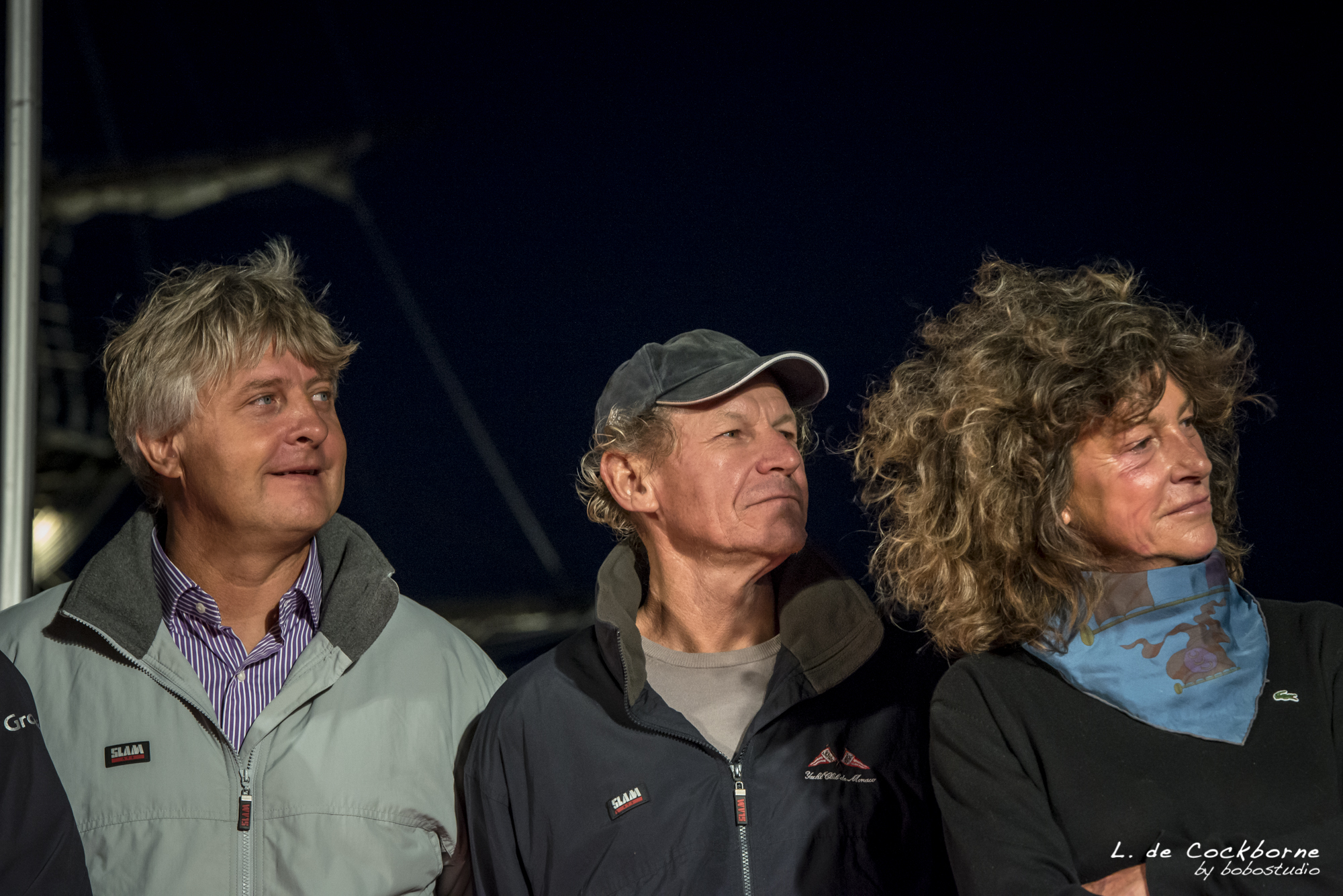 Les anciens vainqueurs de la Route du Rhum Laurent Bourgnon, Philippe Poupon et Florence Arthaud.